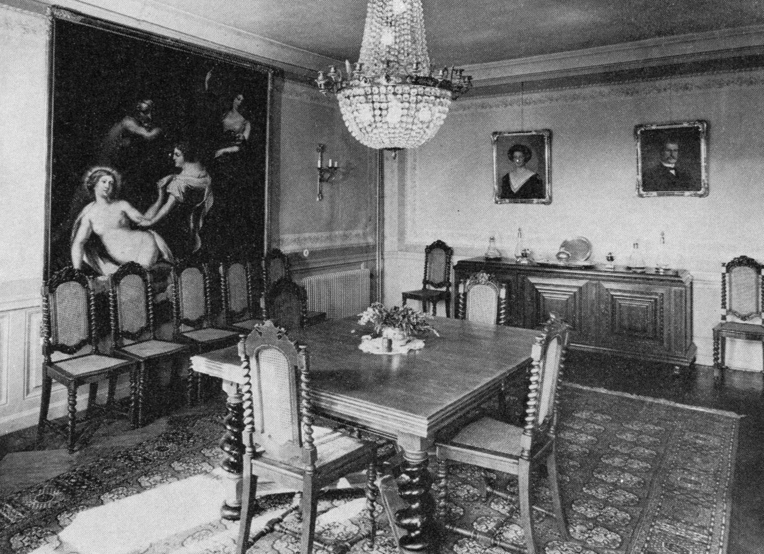 Katrinedals herrgård (matsalen) i Övergarns socken